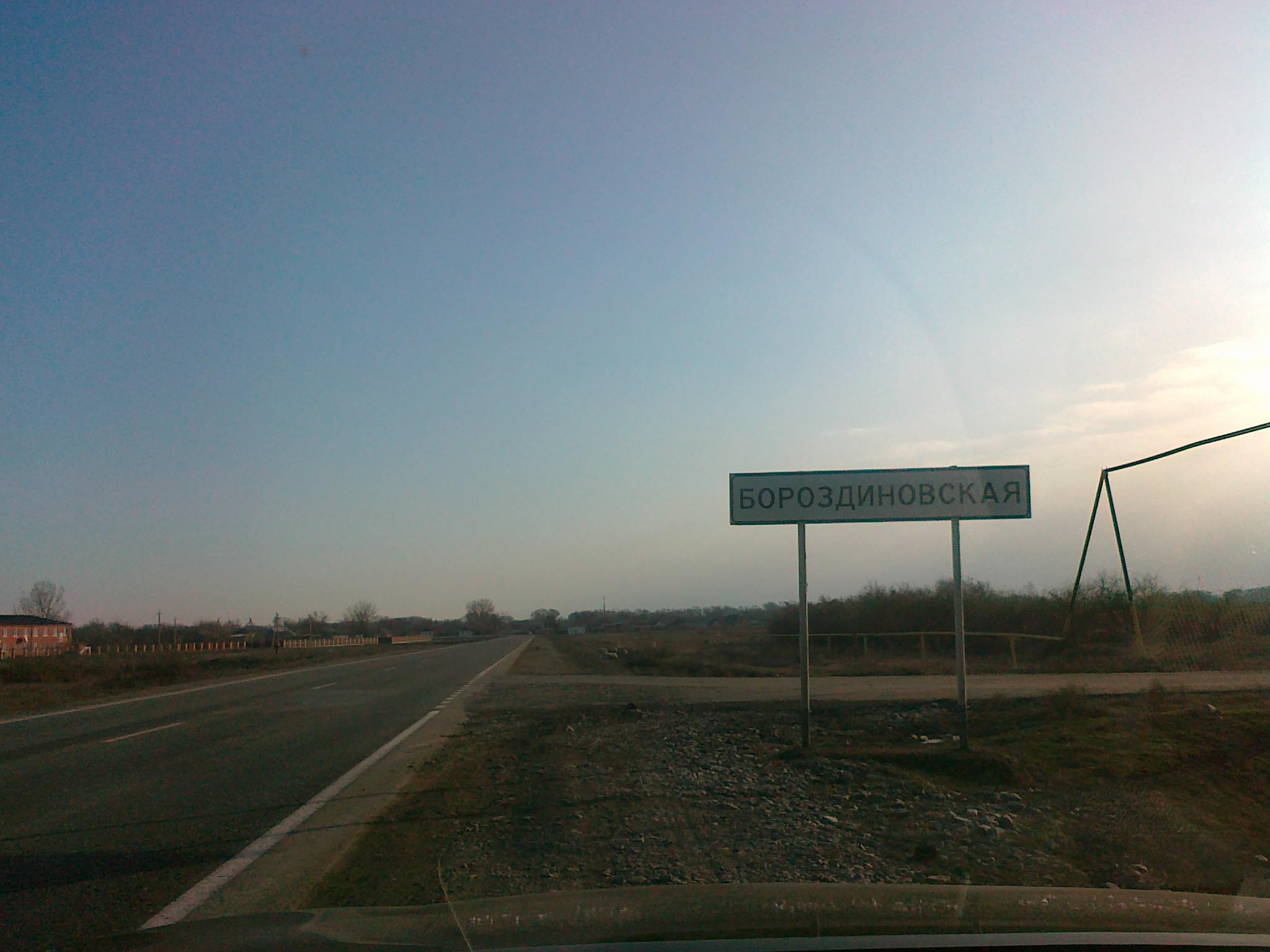 Чеченская Республика сегодня. Бороздиновская This file, which was originally posted to was reviewed on 14 February 2017 by reviewer INeverCry, who confirmed that it was available there under the stated license on that date.